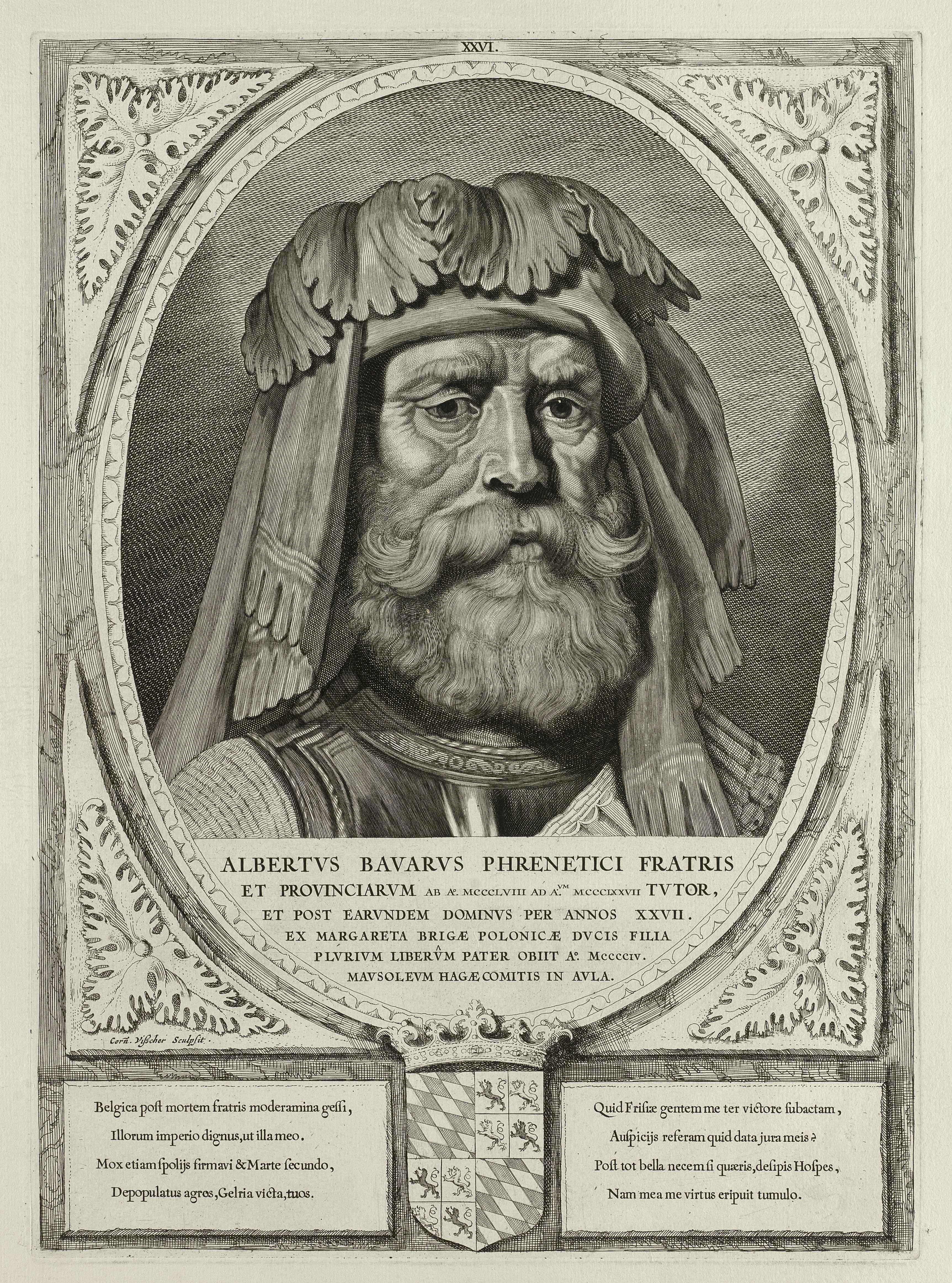 CollectieVoorhelm SchneevoogtInventarisnummerNL-HlmNHA_1477_53012919BeschrijvingPortret van Albrecht van Beieren, graaf van Holland en Henegouwen. Hij draagt een harnas en een hoofdtooi. De omlijsting is versierd met het wapen van Holland.Zesentwintigste prent uit een serie van 38 getiteld Principes Hollandiæ, Zelandiæ et Frisiæ, met portretten van de graven en gravinnen van Holland, Zeeland en West-Friesland.Gravure en ets door Cornelis Visscher (II) met Latijns onderschrift, uitgave toegeschreven aan Pieter Soutman, gesigneerd, middenboven genummerd 'XXVI'.FotonummerNL-HlmNHA_1477_53012919DocumenttypePortrettenVervaardigerVisscher, Cornelis (II) (1628/1629-1658) UitgeverSoutman, Pieter (1593/1601-1657)Plaats van uitgaveHaarlemJaar van uitgave1650-00-00Begindatum1650Einddatum1650TechniekGrafiek Drukwerk Trefwoordengraven en gravinnen LiteratuurHollstein Dutch, Cornelis Visscher (II), 103